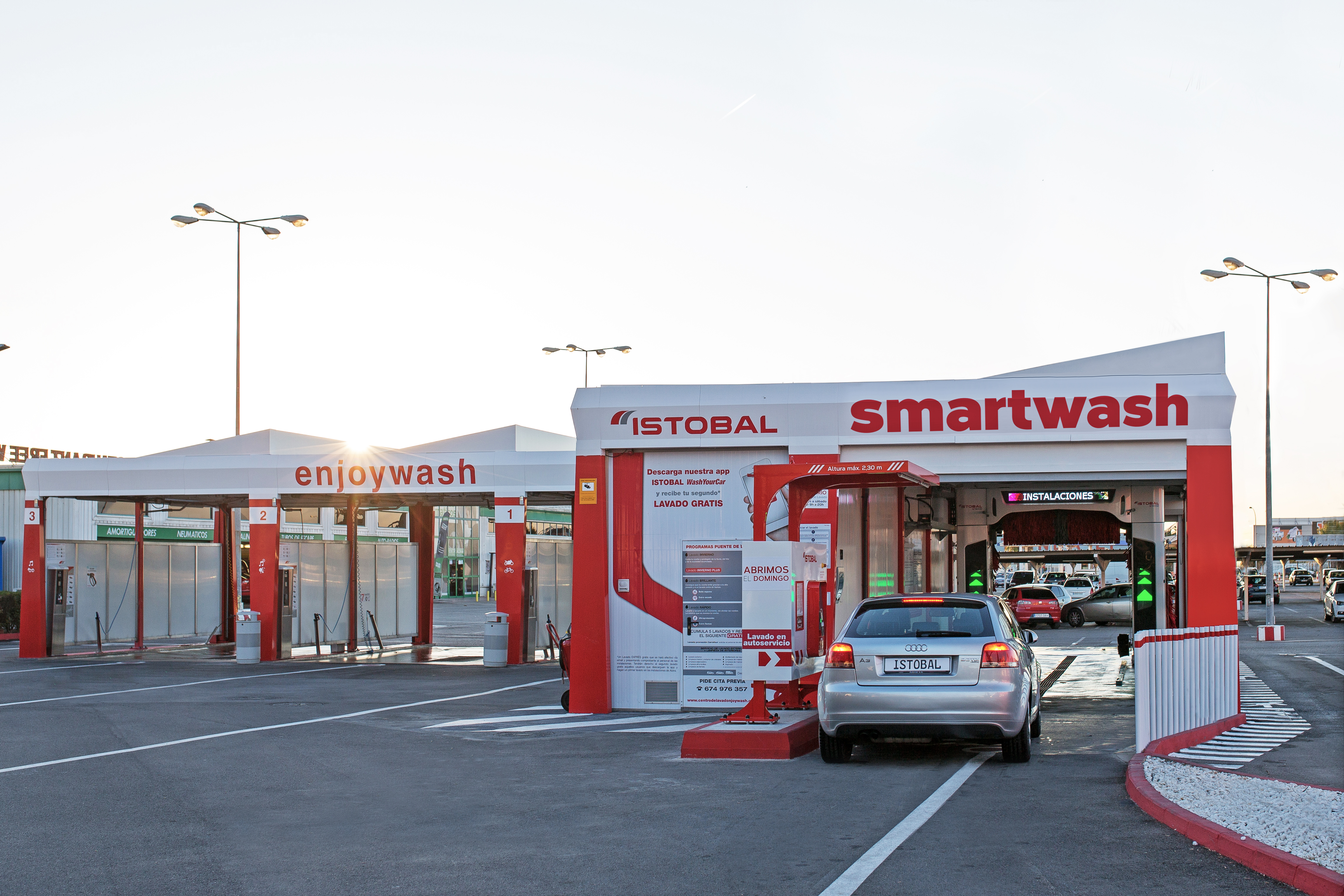 Instalación 100% conectada